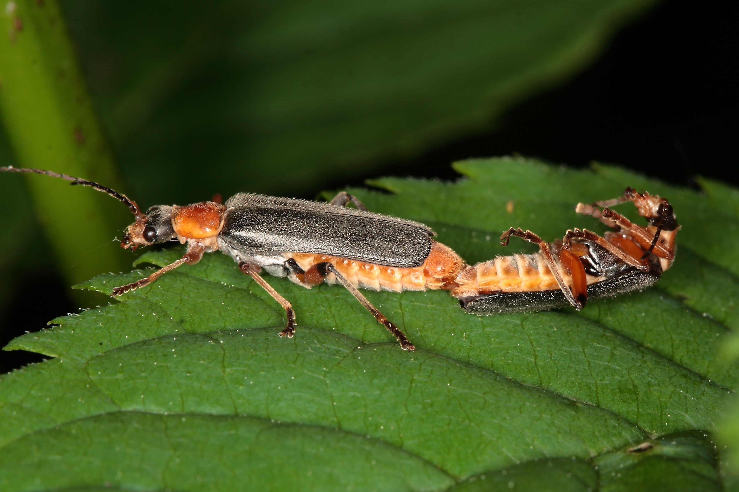 Cantharis_pellucida, Paarung (Sachsen)